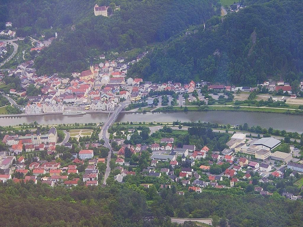 Luftaufnahme aus 300mtr Höhe